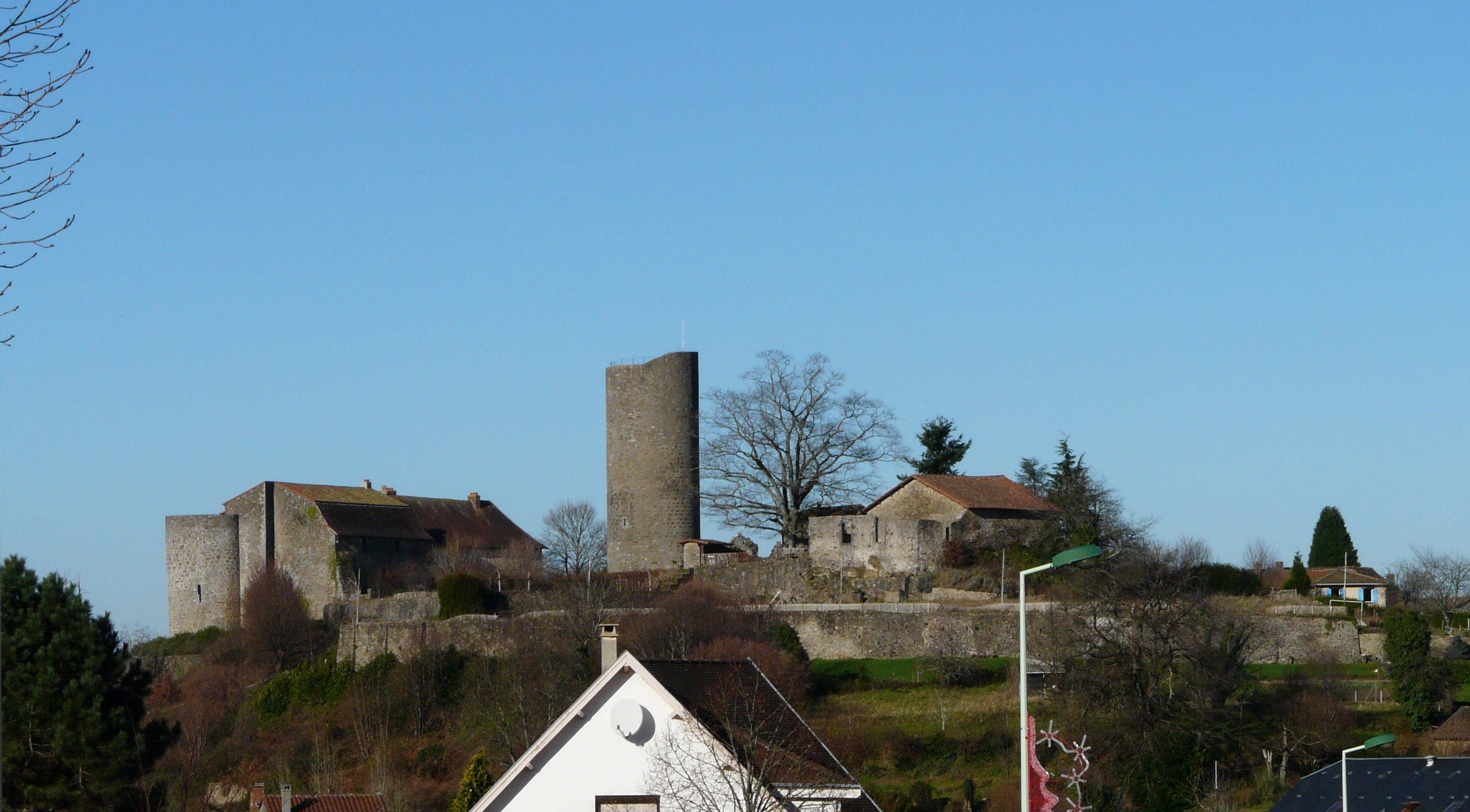 Le château de Châlus-Chabrol, Châlus, Haute-Vienne, France